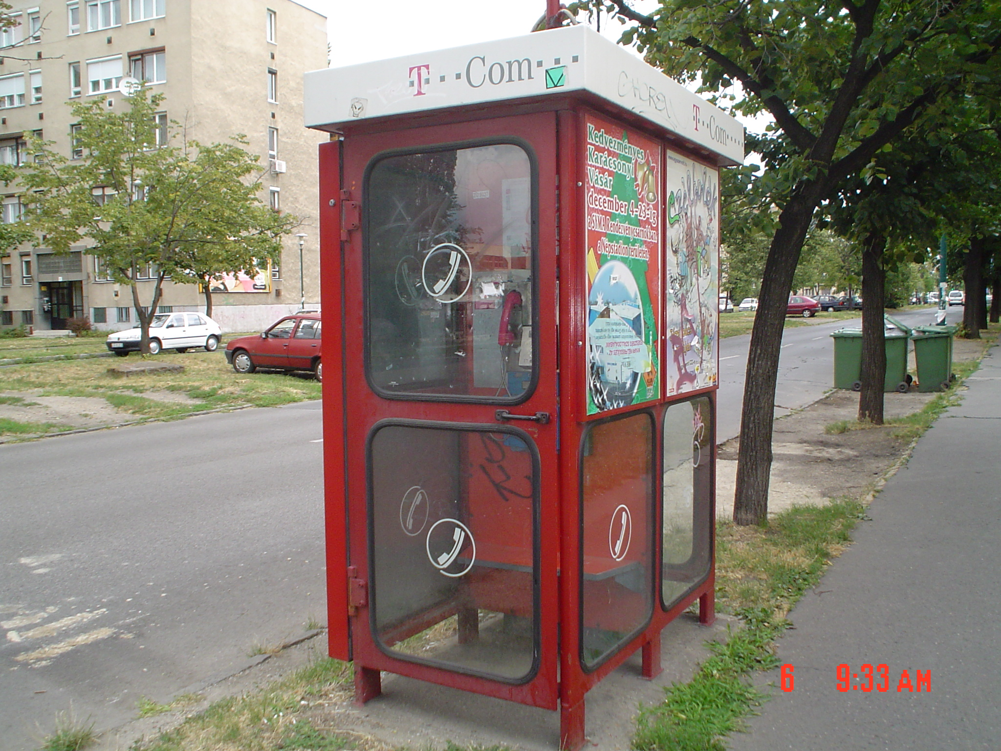 Ĝemela telefonĉelo en strato de Budapeŝto.